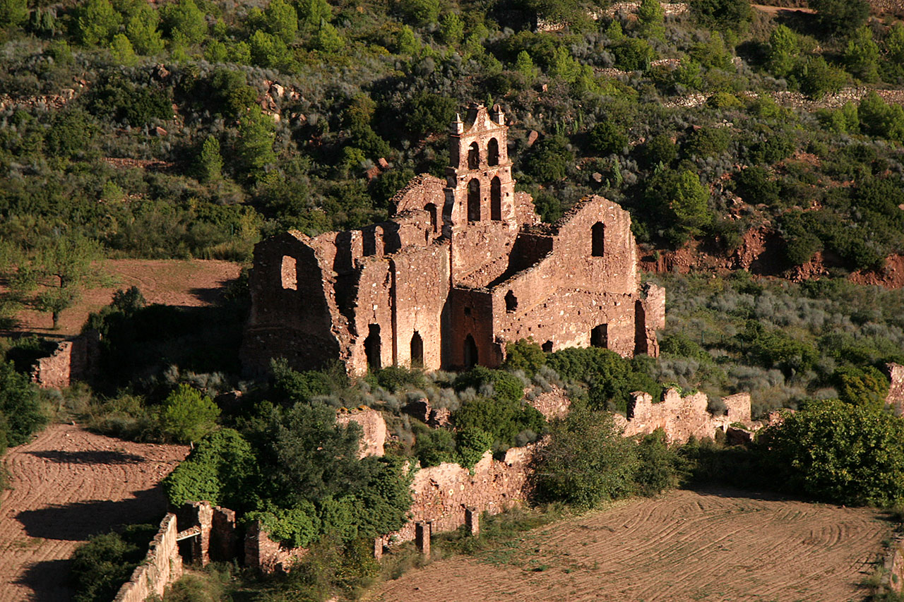 Desierto de las Palmas en Benicasim, Castellón, España.